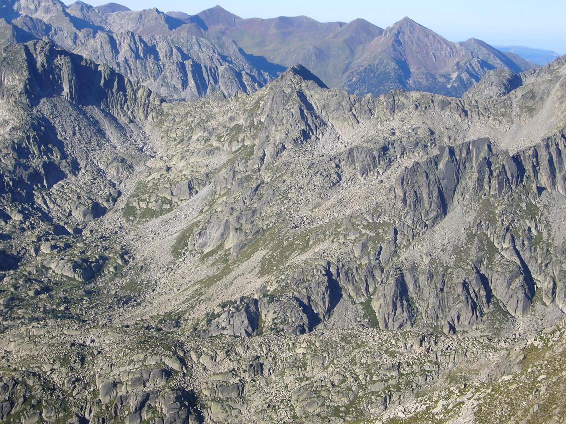 Pic del Portarró, Portell i Cap de Crabes, i Coll del Bergús vistos des del Pic d'Amitges; Espot, Pallars Sobirà, Catalunya